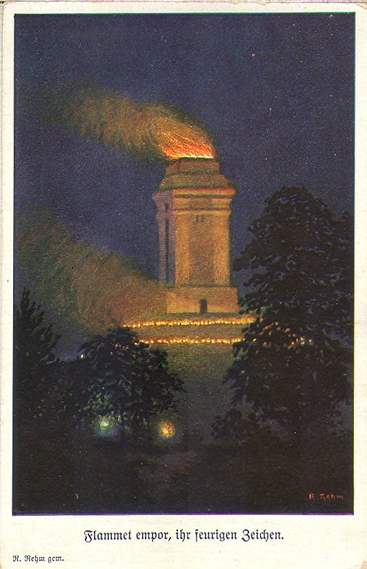 Stellen wir den Bismarckturm auf den Berg; den Göttern wird es schon dämmern ...